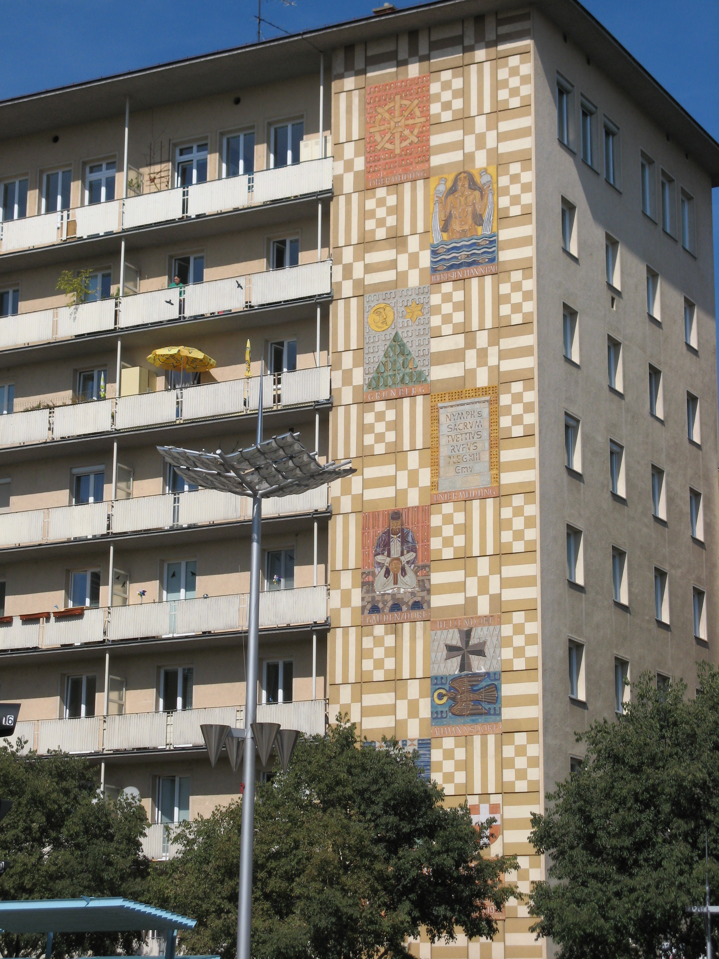 August-Fürst-Hof (1955-57) mit Majolikabildern der historischen Wappen Meidlings, Meidlinger Hauptstraße 8-10, Wien-Meidling